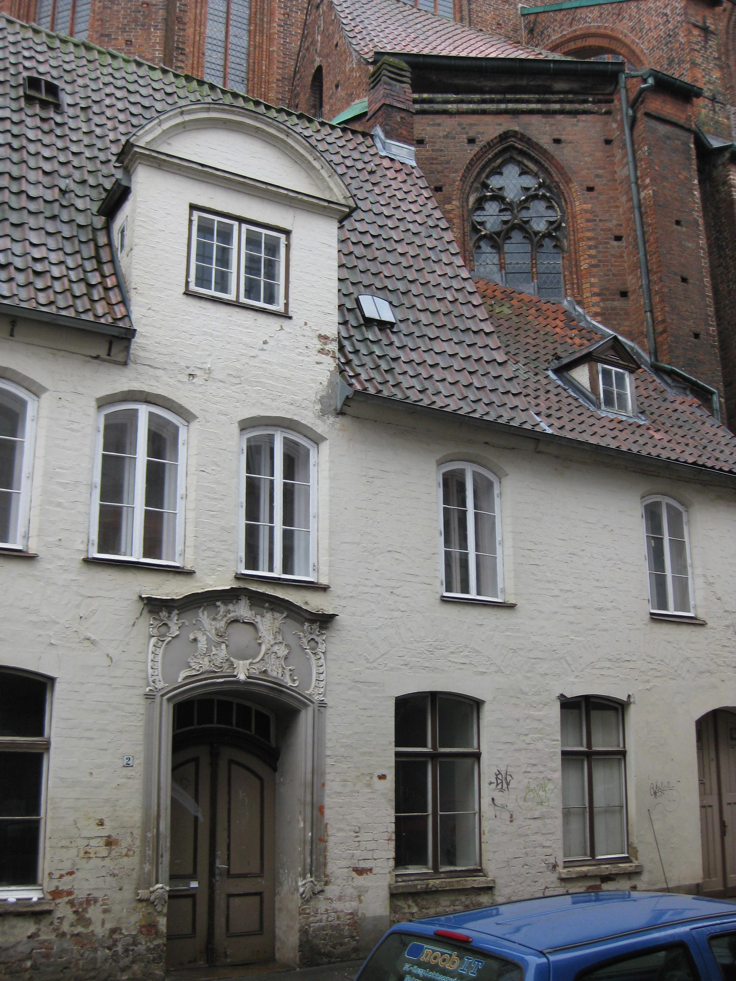 Werkmeisterhaus der Katharinenkirche in Lübeck, Glockengießerstraße 2, angebaut an die Nordseite des Chors der Kirche.